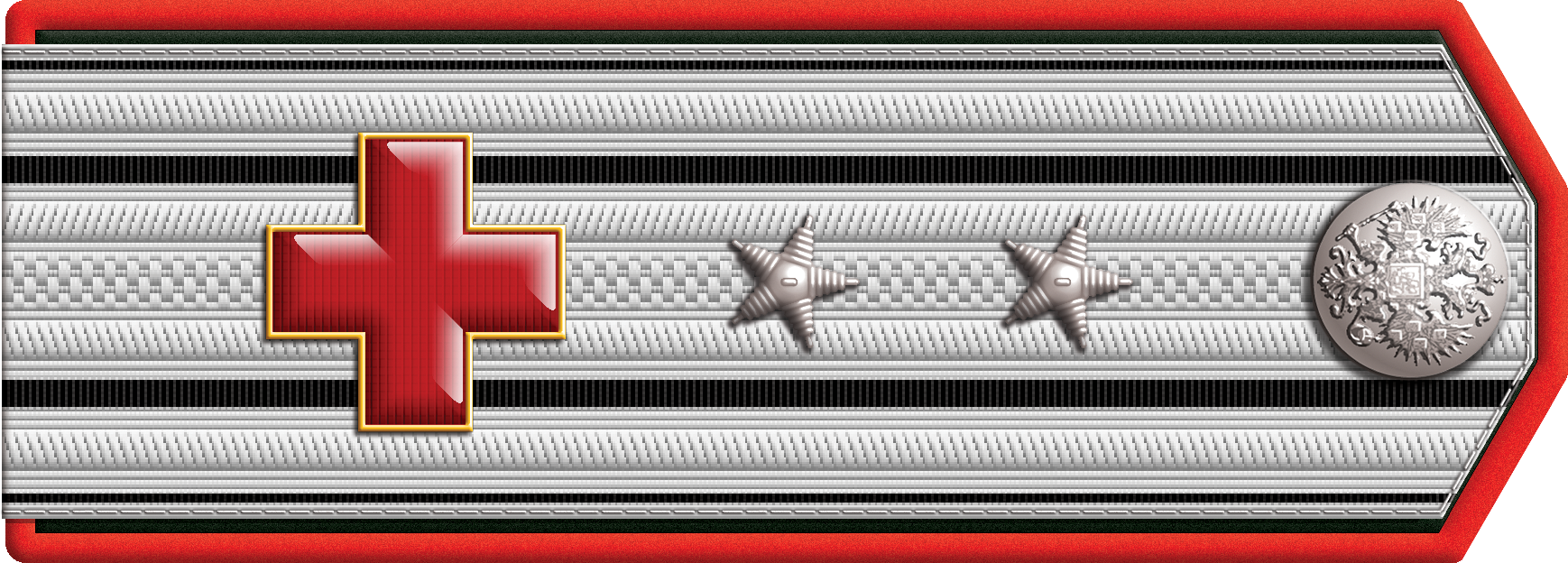 Погон: военный врач, коллежский асессор, состоящий на службе в Российском обществе Красного Креста, 1915–1917 гг.